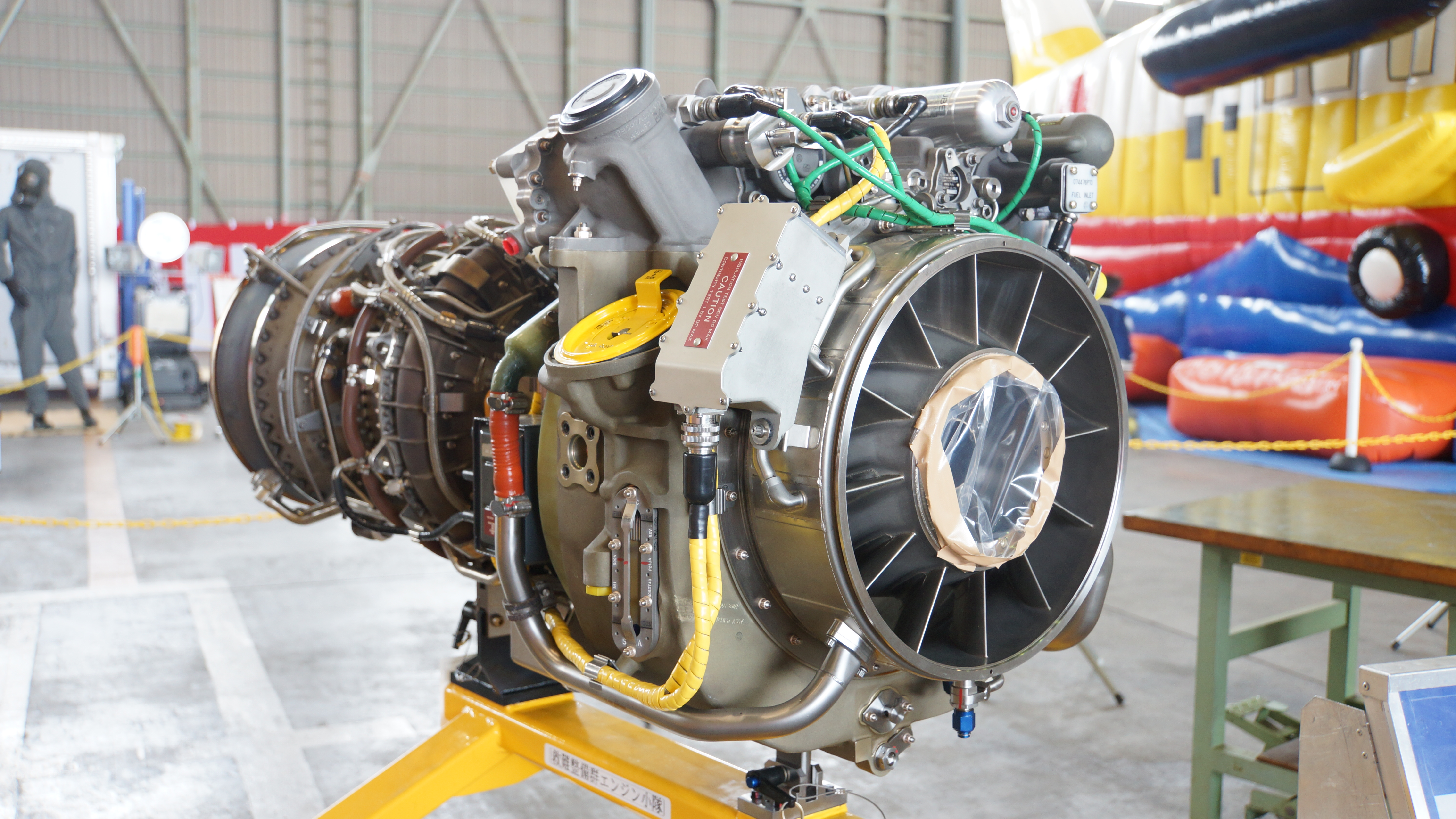 T700-IHI-401Cターボシャフトエンジン（UH-60J用） 右前面。2016年3月13日 航空自衛隊小牧基地にて。